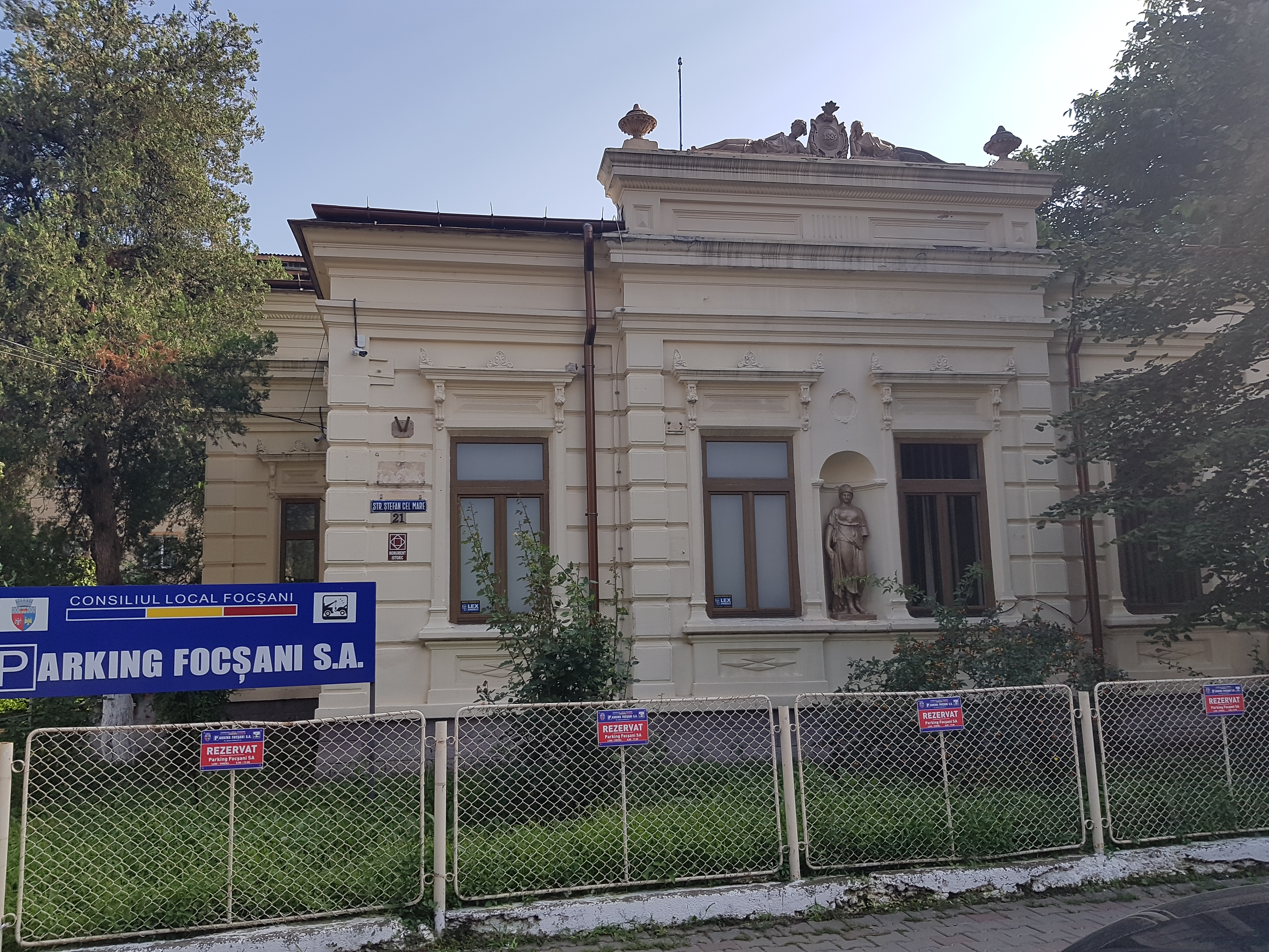 Casa Brăileanu